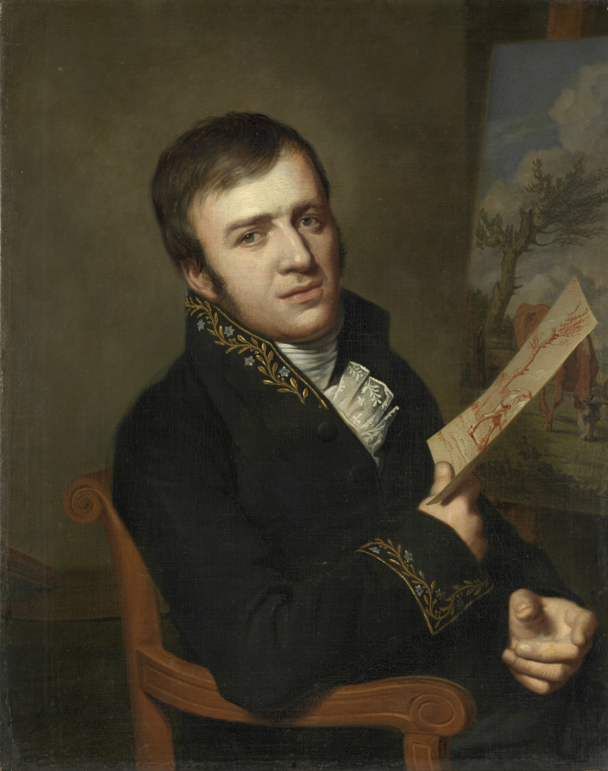 Portret van Jan Kobell (II), schilder, in het uniform van een lid van het Koninklijk Instituut van Wetenschappen, Letterkunde en Schoone Kunsten. De schilder is voorgesteld zittend in een stoel met een tekening in de hand, voor een ezel waarop een schilderij van een landschap met grazend vee staat. Op de tekening staat dezelfde voorstelling als op het schilderij.